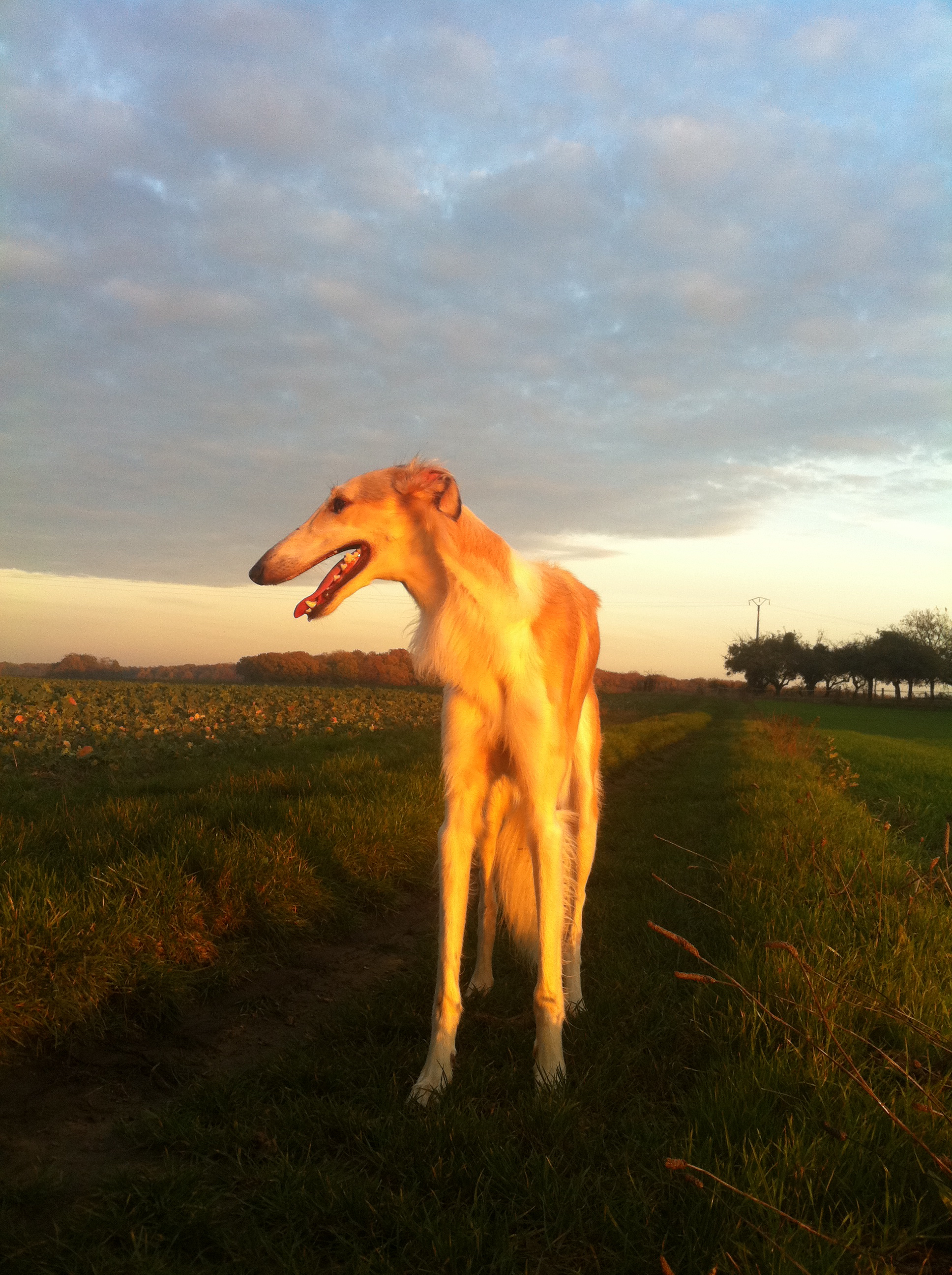 LEVRIER BARZOI BORZOI GREYHOUND IMG 3832 Ænglisc: BORZOI GREYHOUND IMG 3832